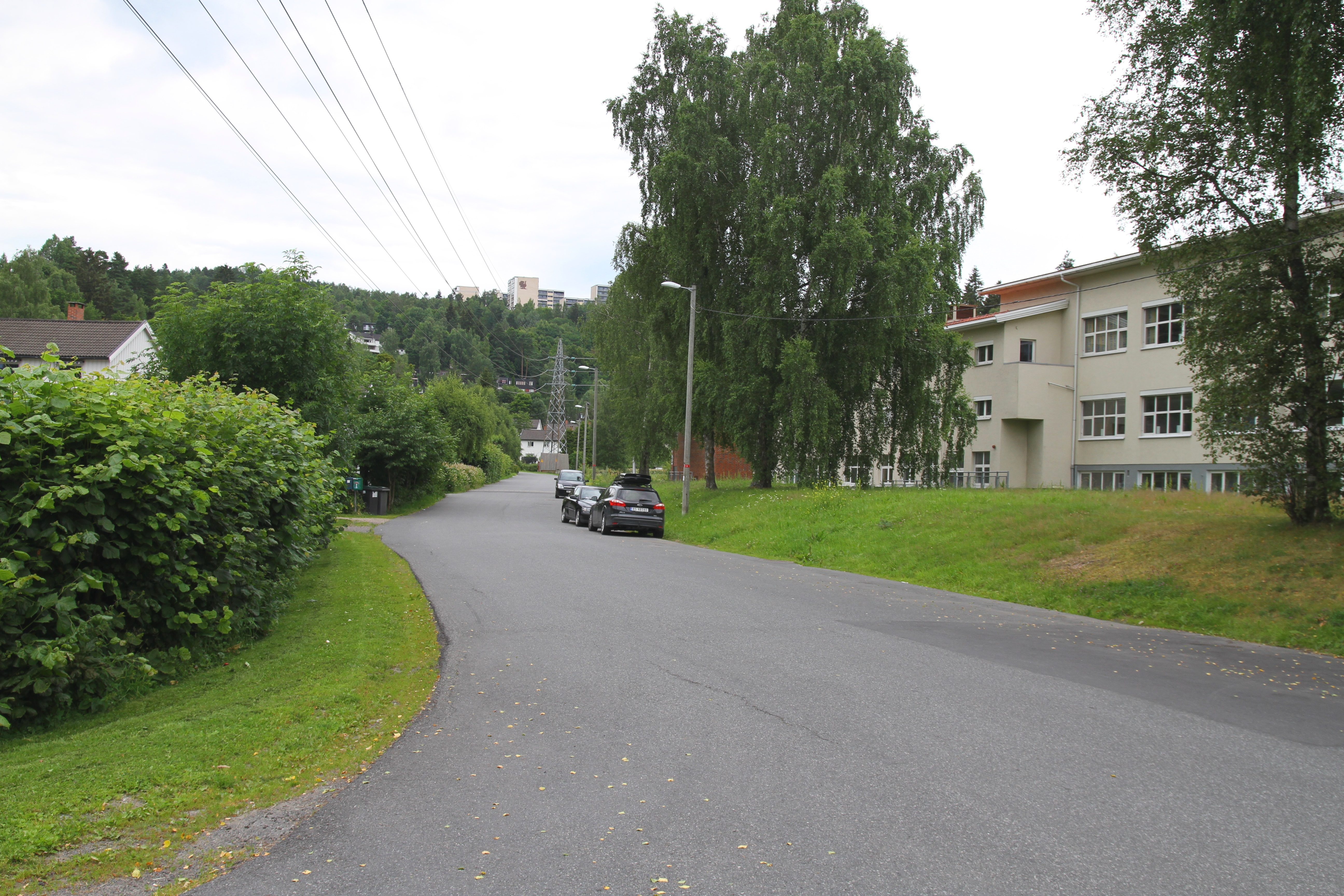 Vestbyveien i Oslo.